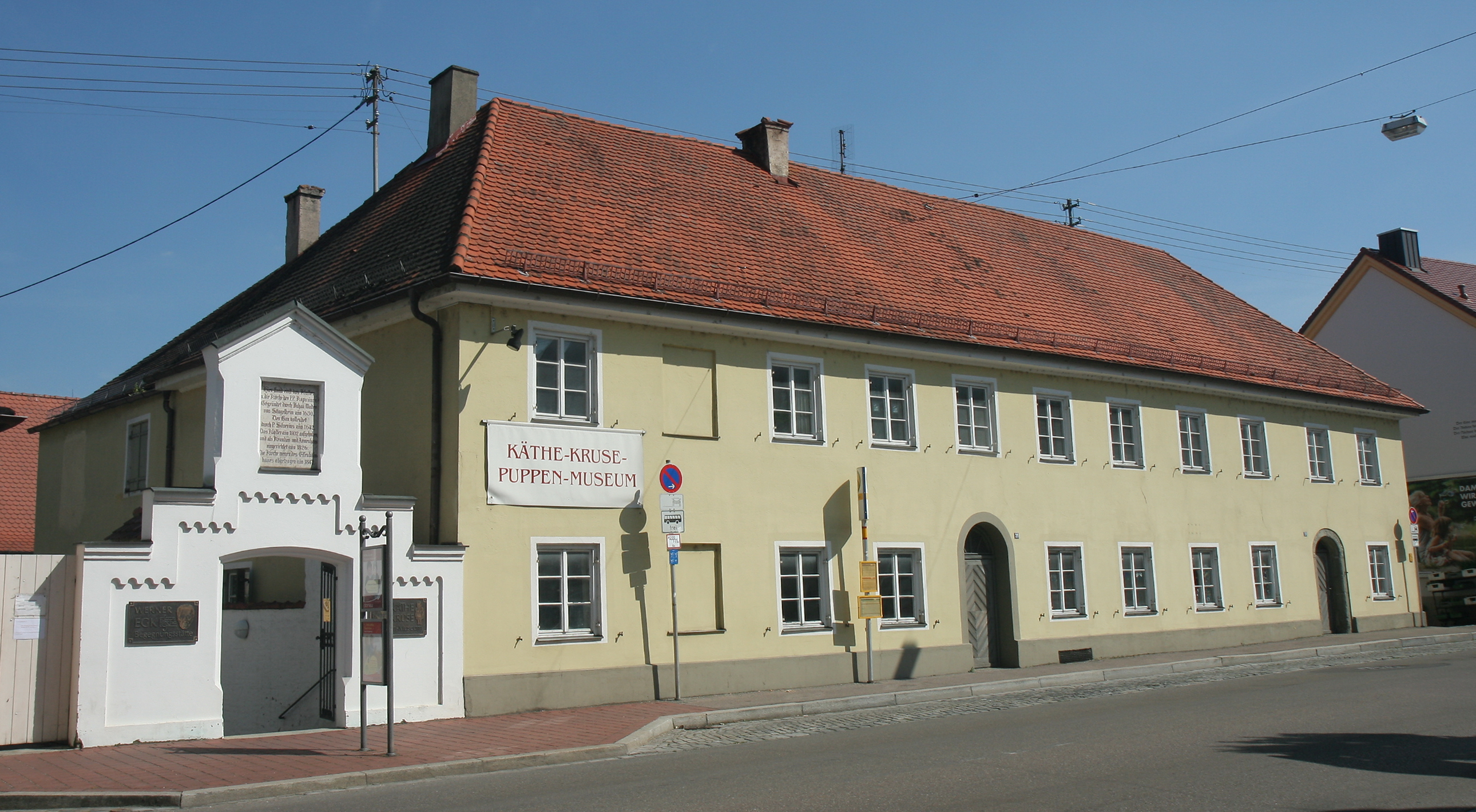 Kapuzinerkloster Donauwörth; Käthe-Kruse-Puppen-Museum in Donauwörth, Pflegstraße 21 a.